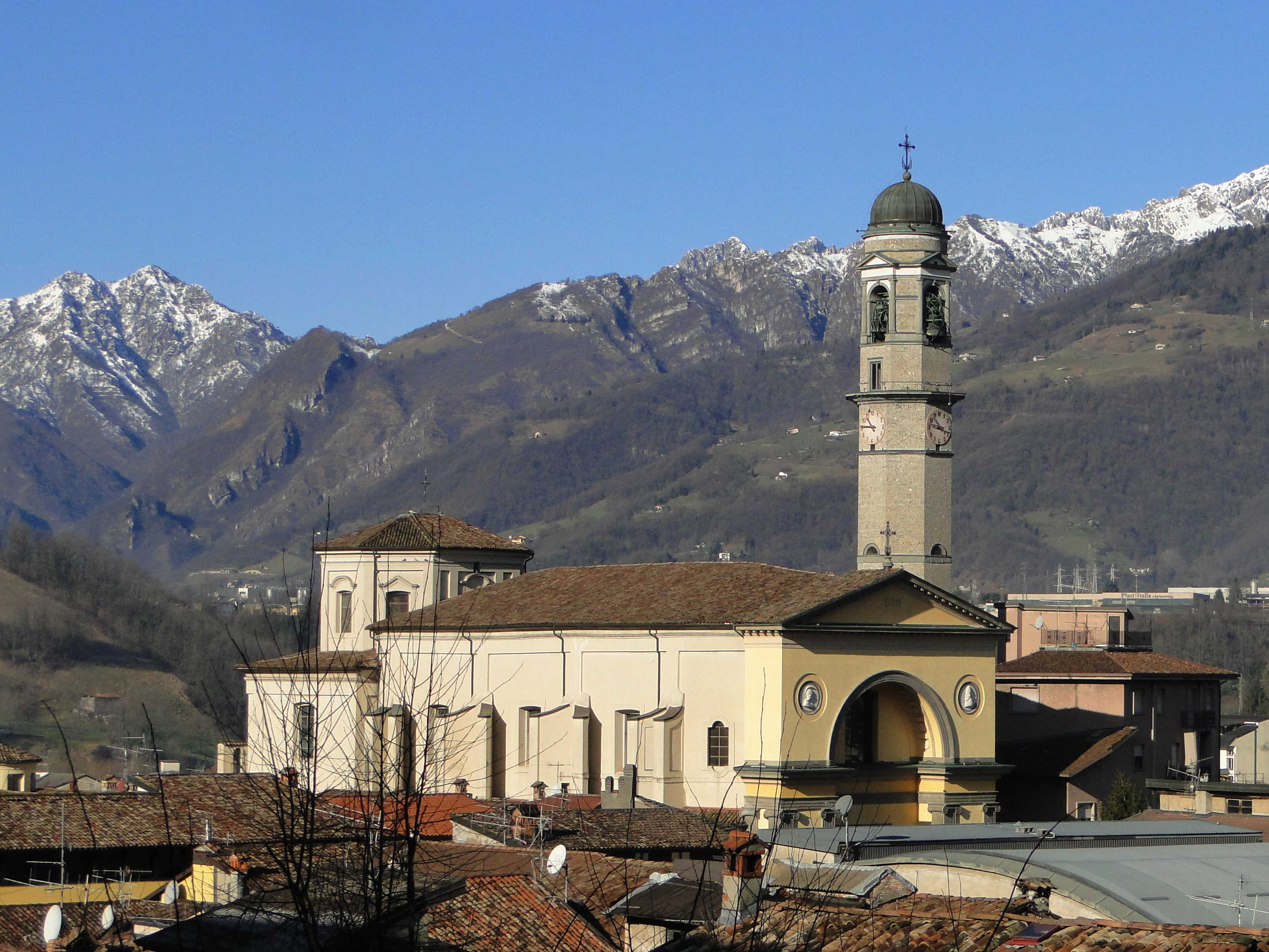 Chiesa parrocchiale di san Michele. Leffe (BG). Italy